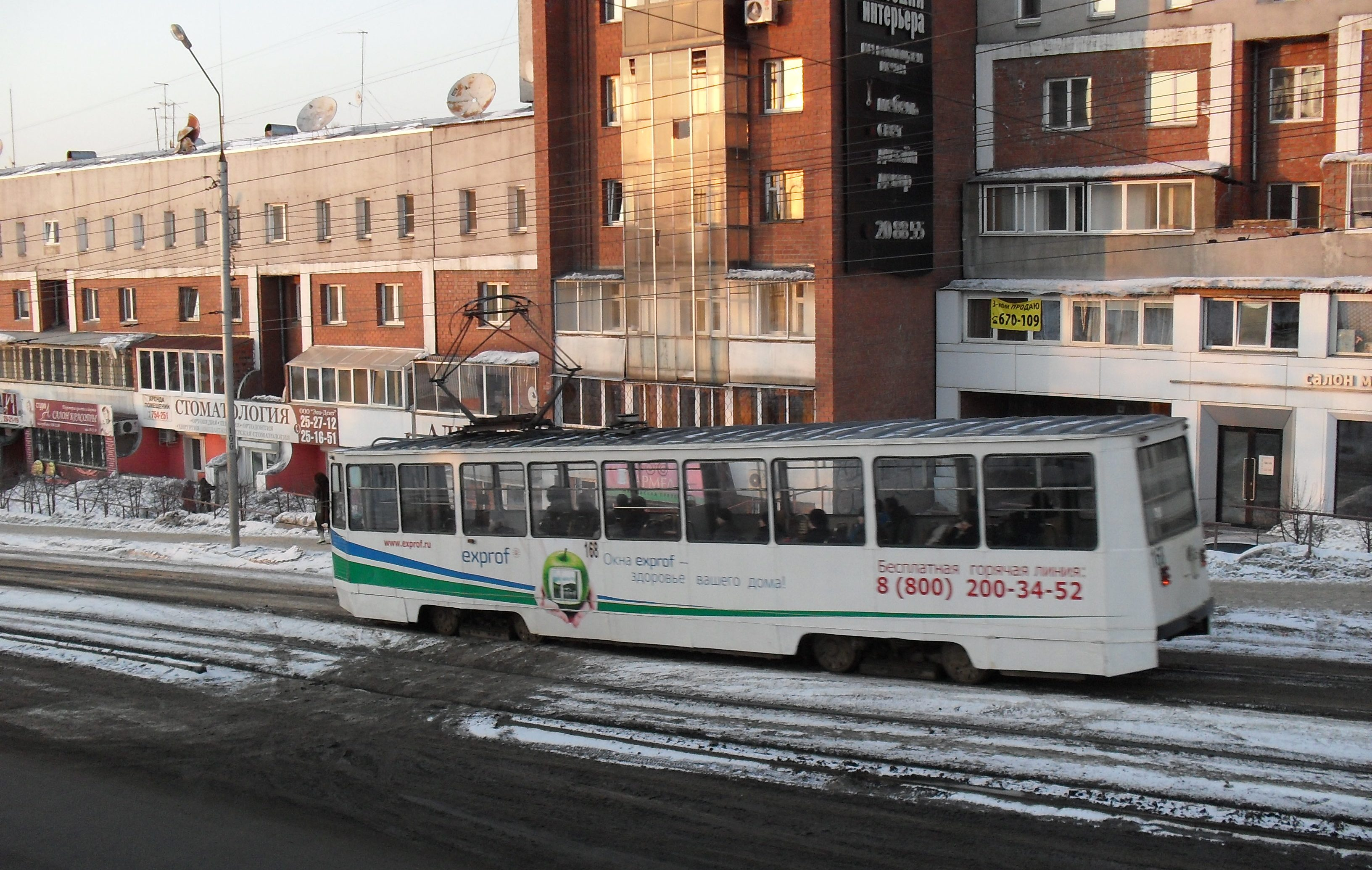 Иркутск. Трамвай на улице Декабрьских событий.